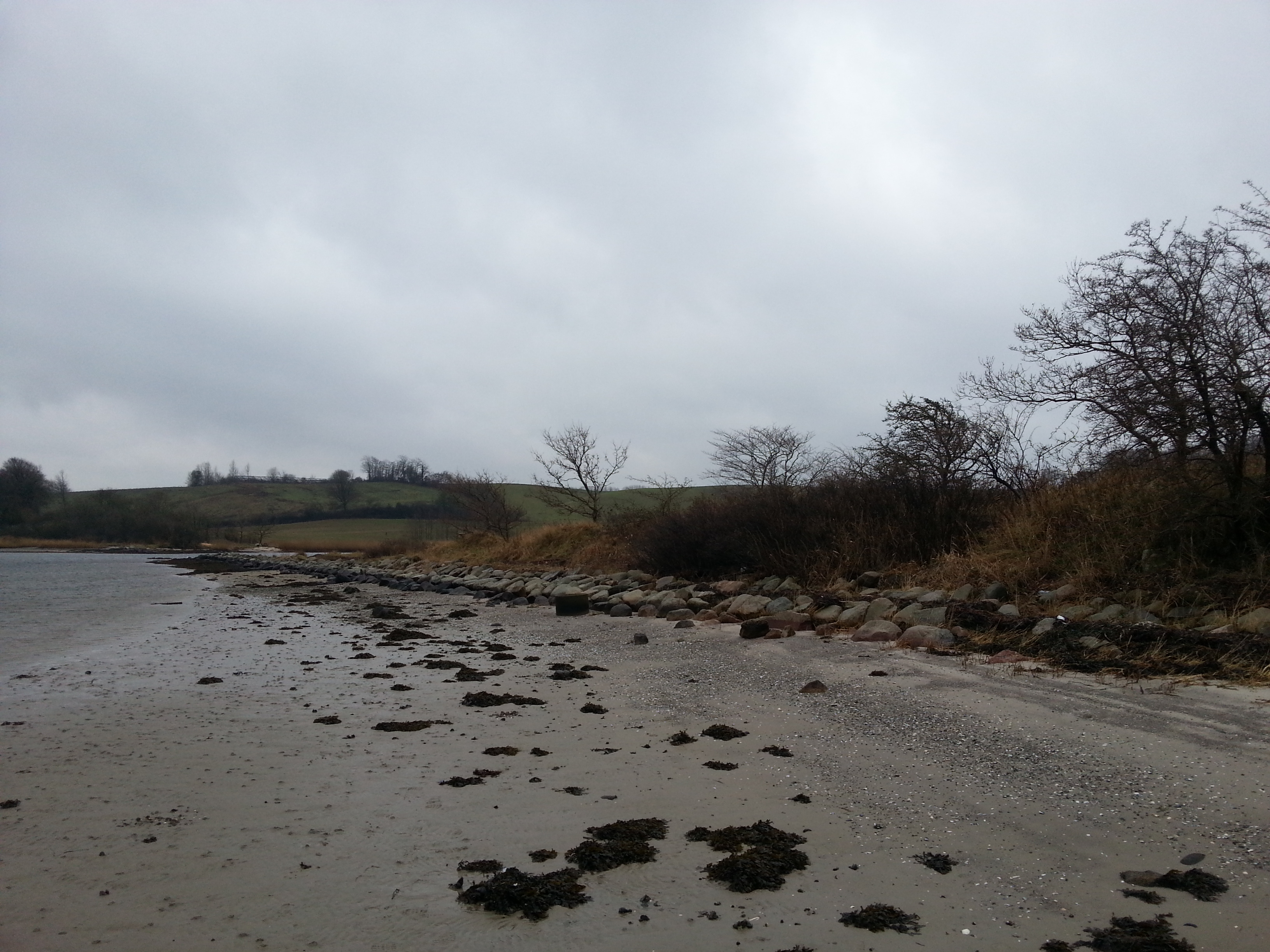 Dæmningen ved Eltang Vig set fra stranden på øst-siden.